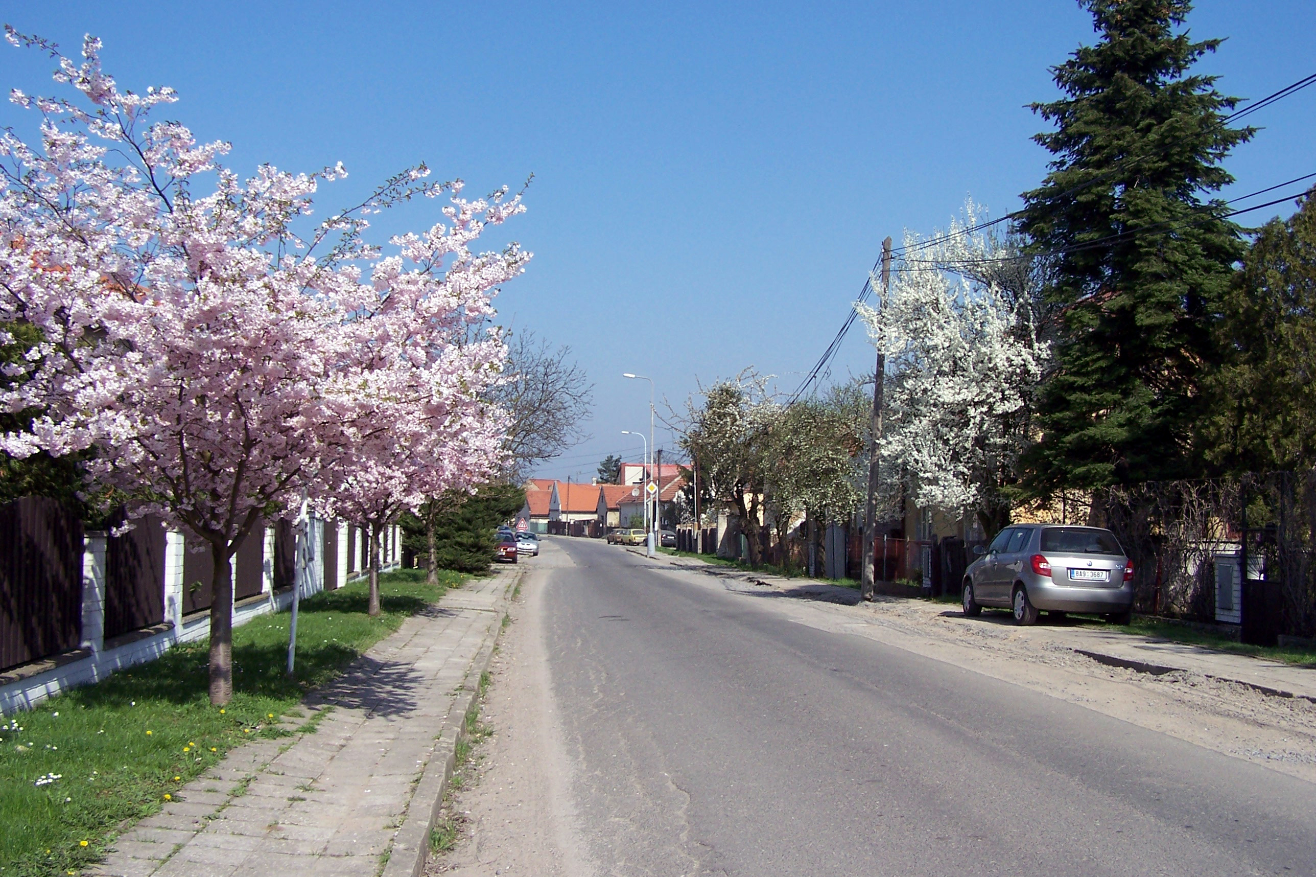 Ratenice – hlavní ulice, hned za začátkem obce v pohledu od Cerhenic.